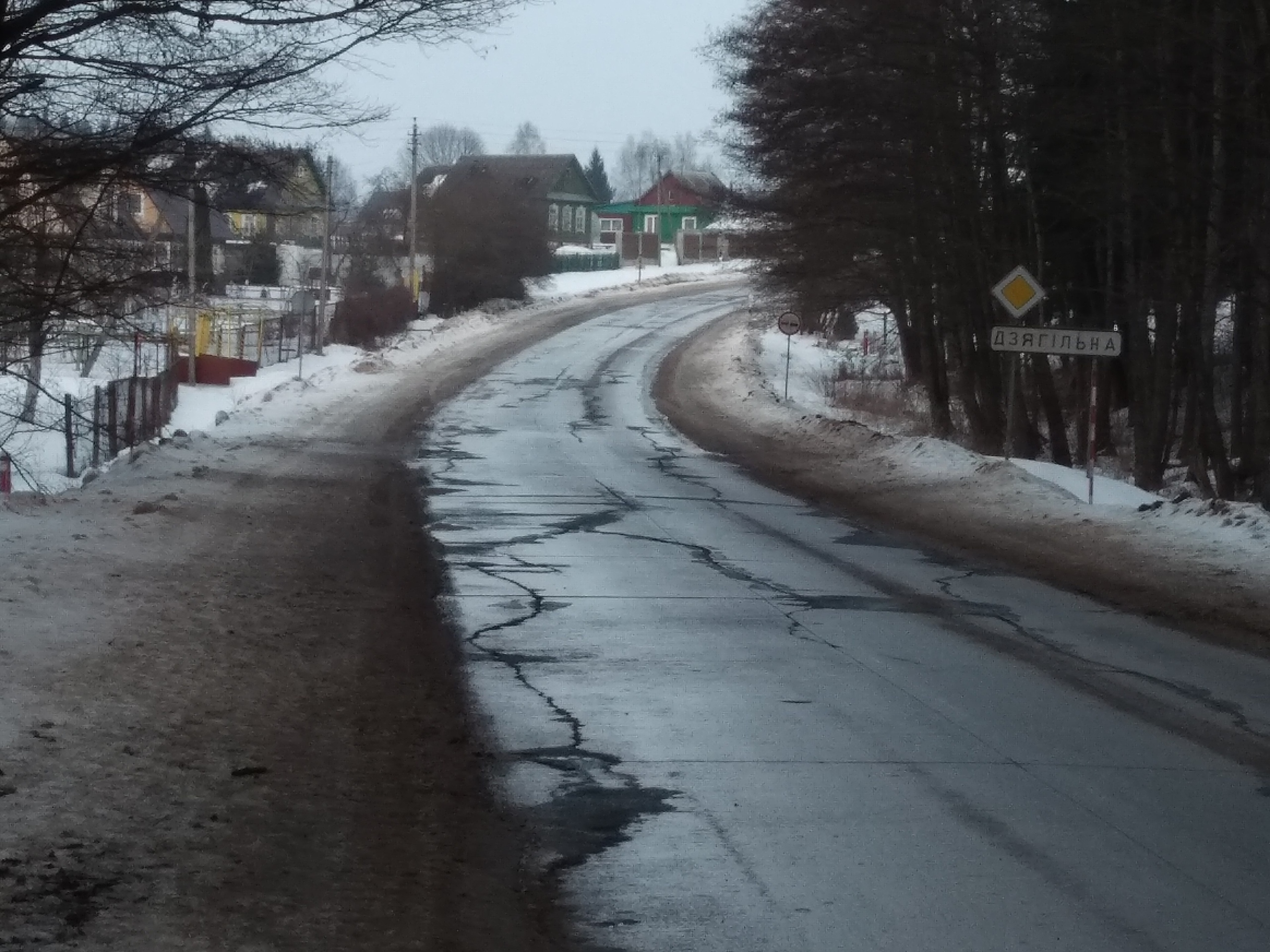 западный въезд в д. Дягильно (с/т Голубые Пруды), зимний пейзаж